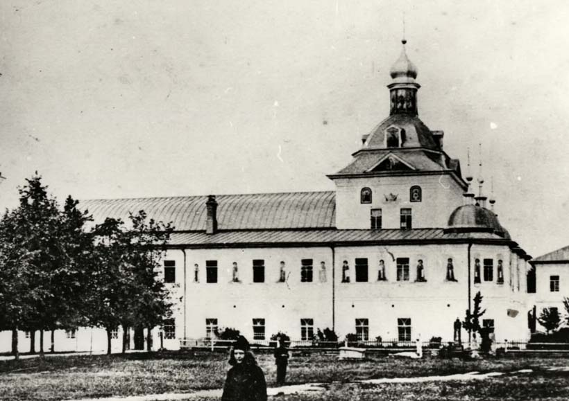 "Старый" собор Белобережской пустыни (со старинной открытки)